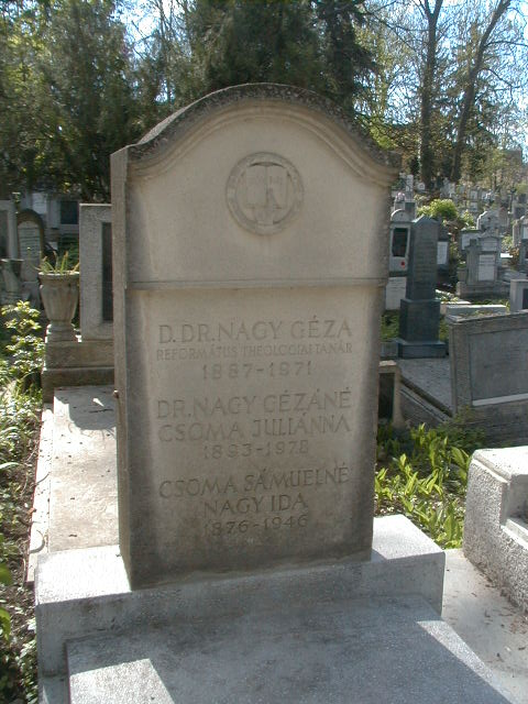 Nagy Géza sírja Kolozsvárott, a Házsongárdi temetőben. 330